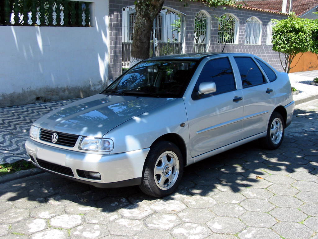 Volkswagen Polo Classic